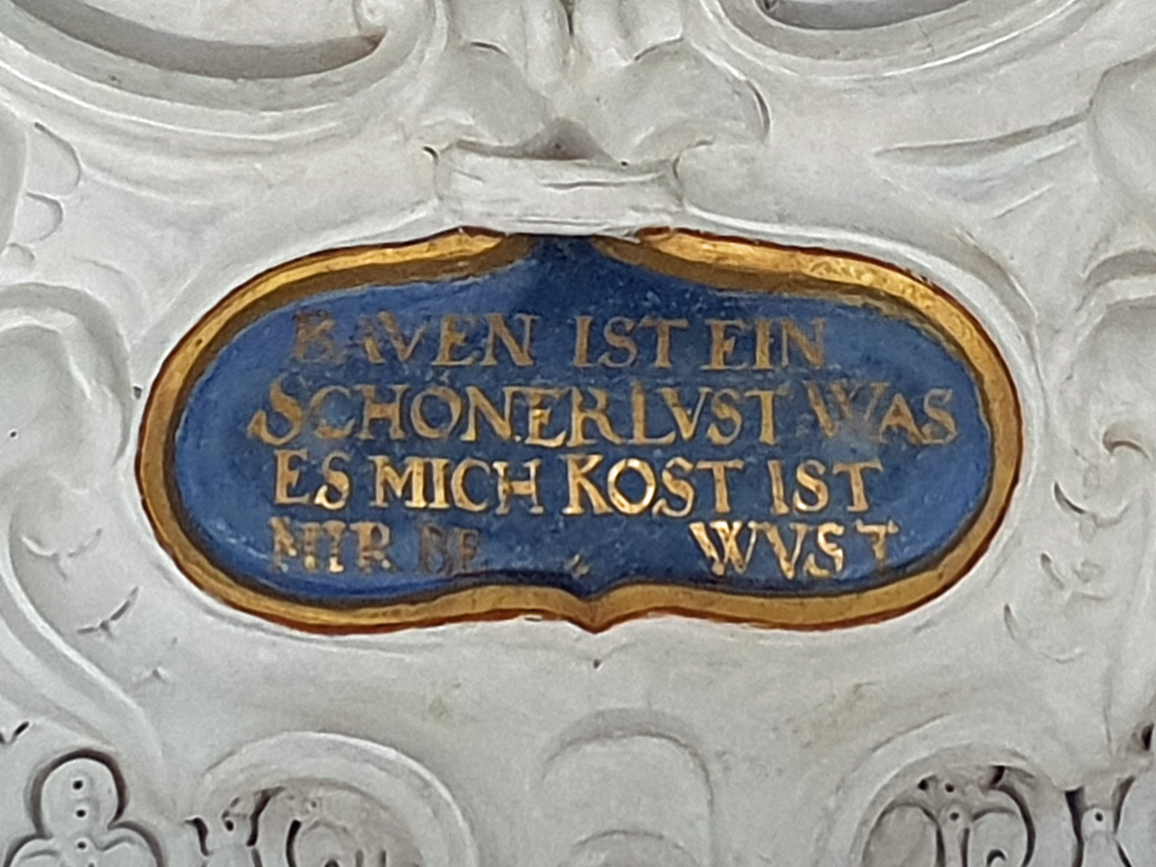 Spruch "BAVEN IST EIN SCHÖNER LVST WAS ES MICH KOST IST MIR BEWVST" im Weißen Saal auf der Riegersburg.